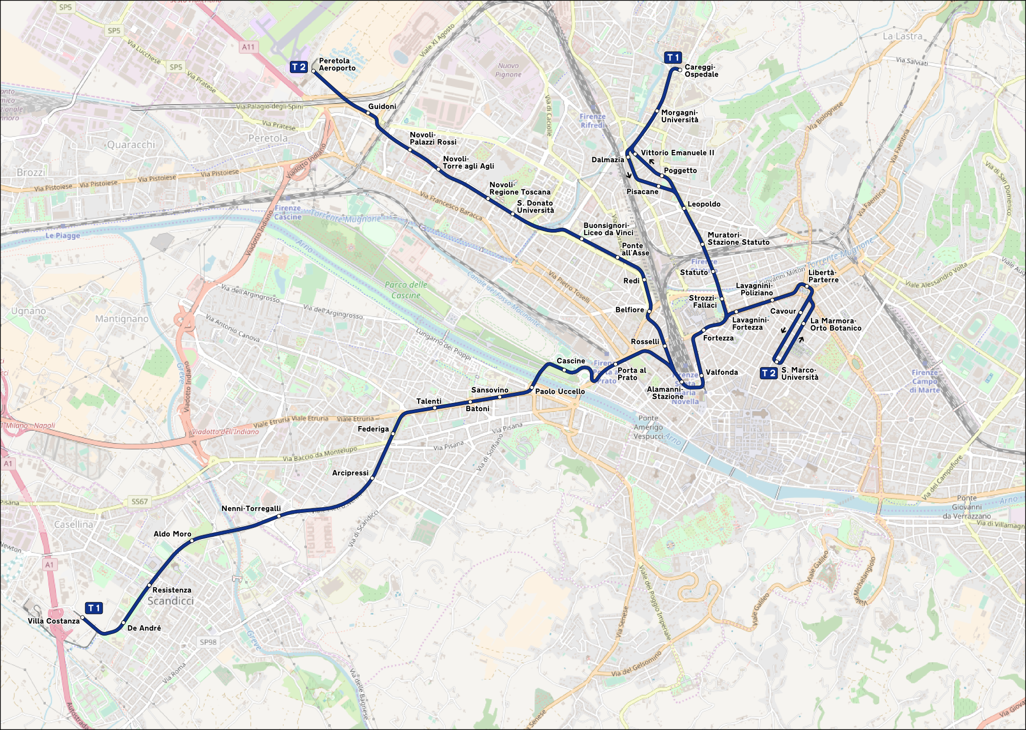 Mappa della rete tranviaria di Firenze. This map may be incomplete, and may contain errors. Don't rely solely on it for navigation.